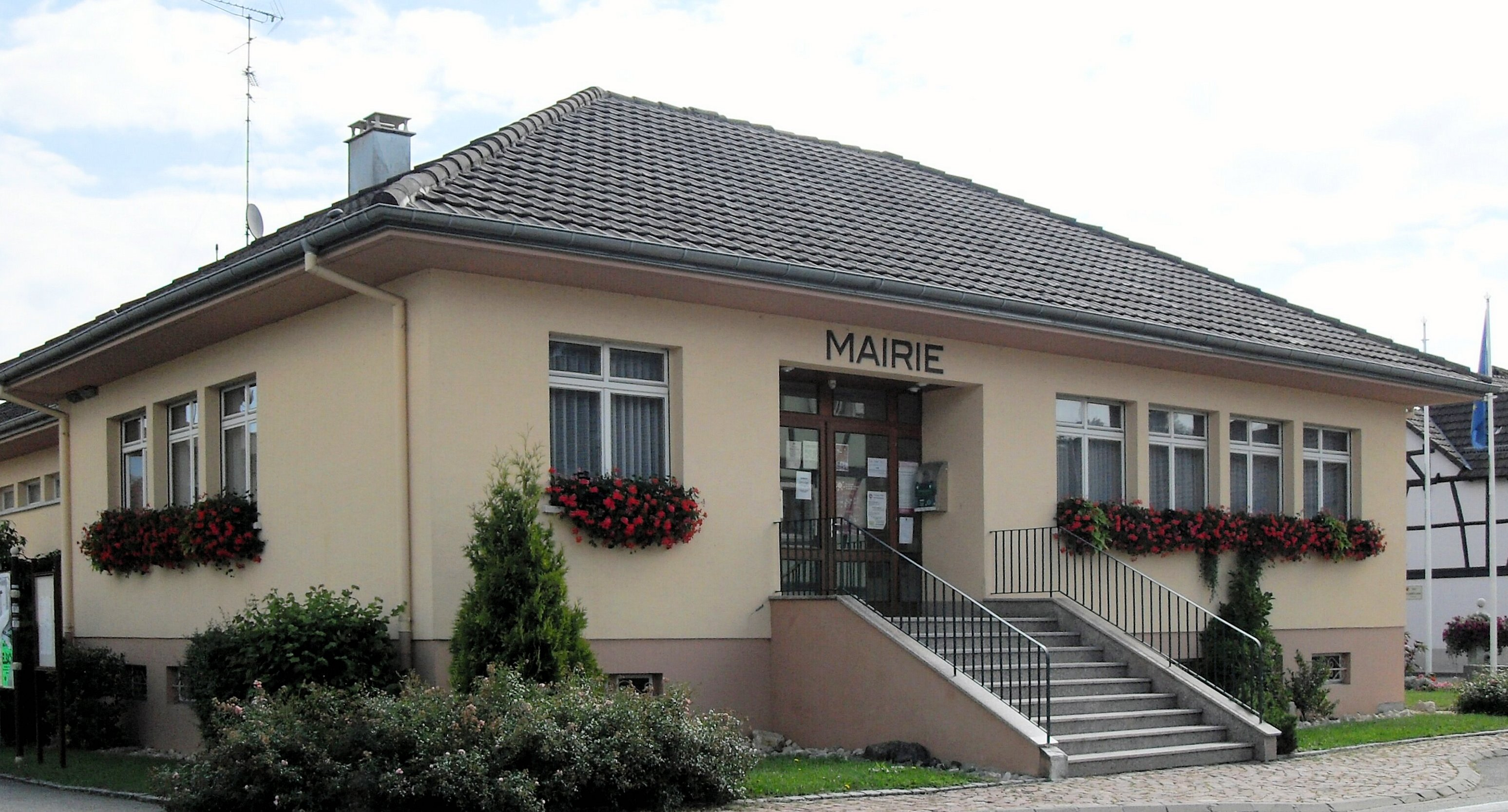 La mairie de Michelbach-le-Bas